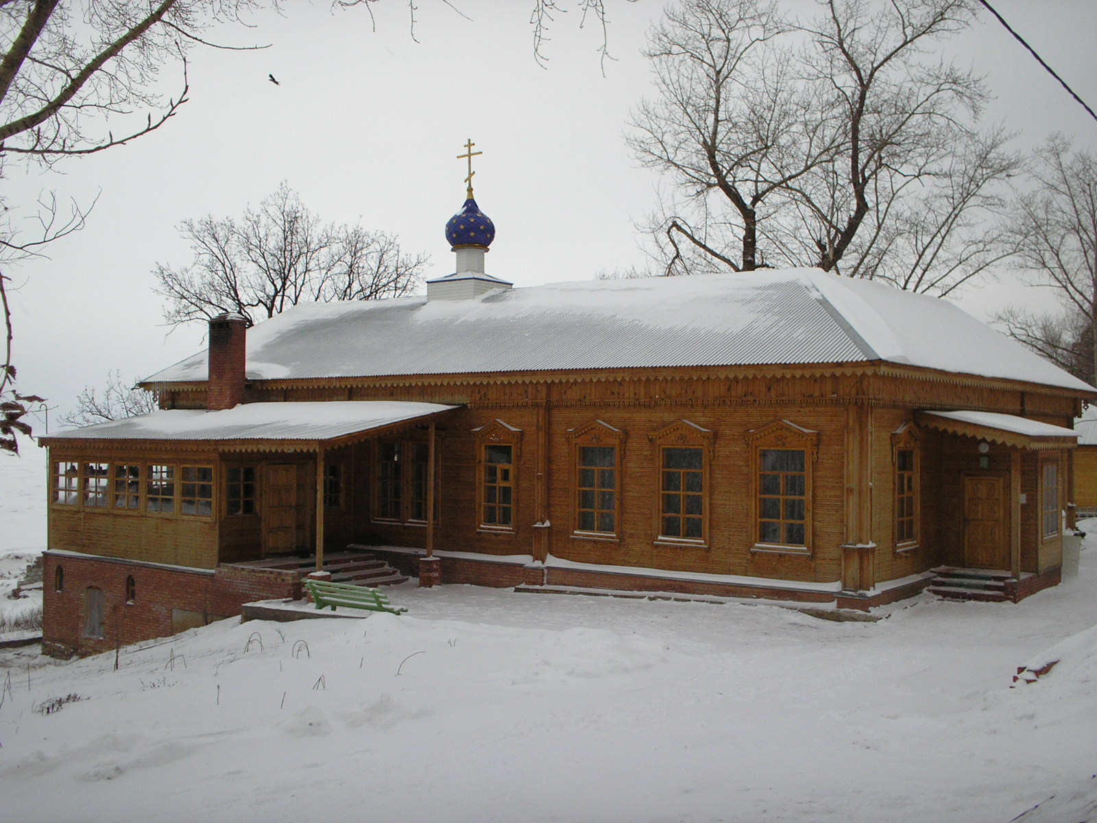 монастырь в Портпоселке